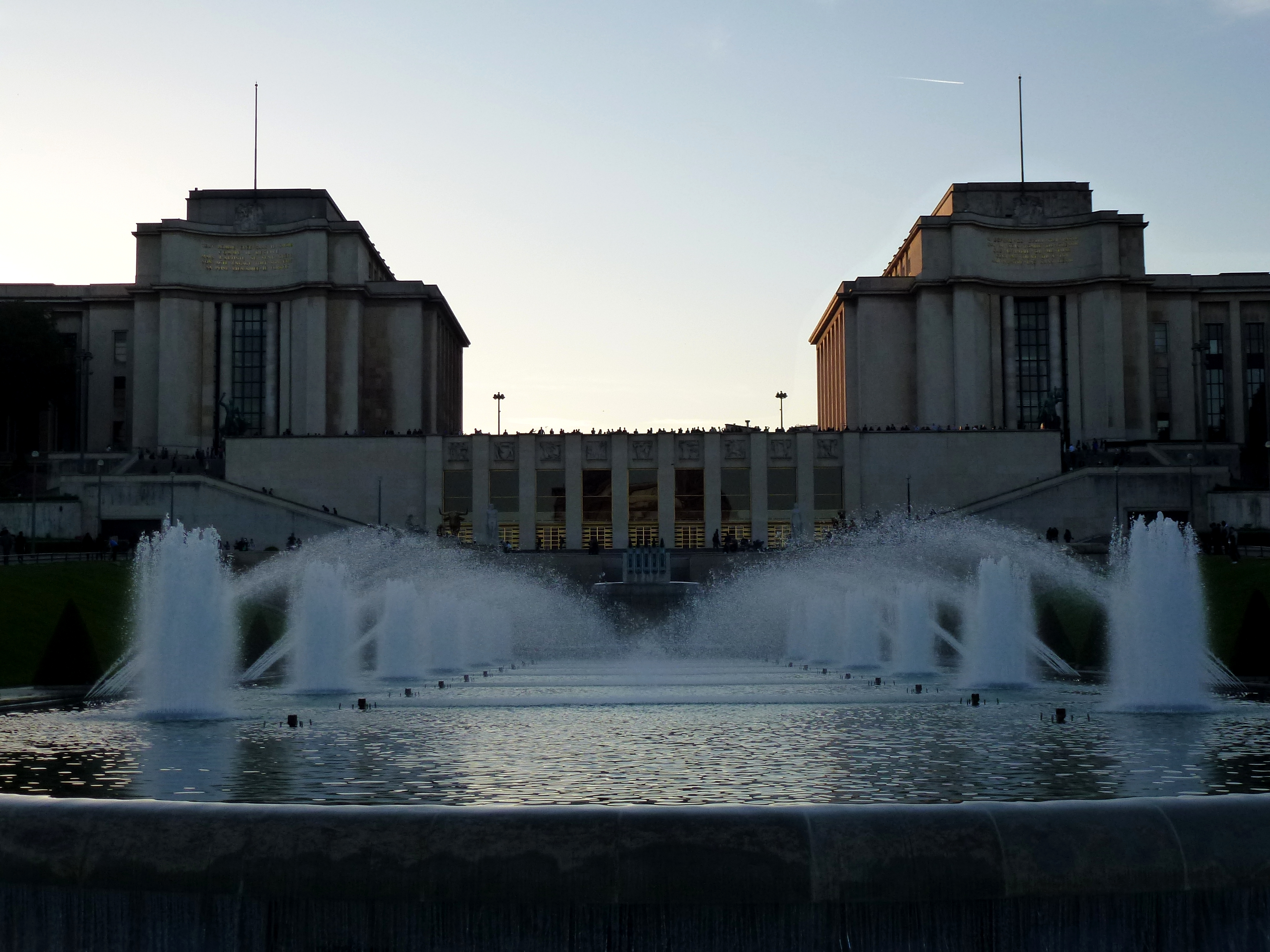 Palais de Chaillot (Classé) .